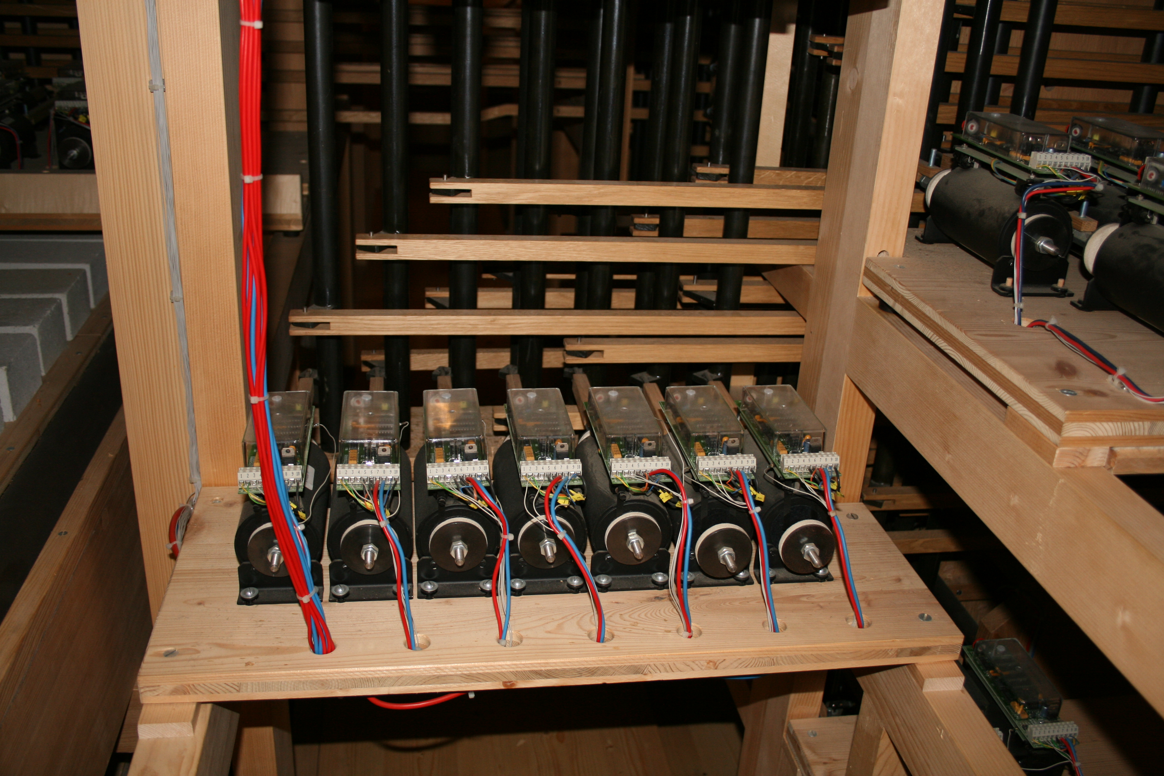 Innenleben der Goll Orgel in St. Martin, Memmingen. Elektrische Schleifenzugmagnete, die ebenso wie die von rechts kommenden Zugstangen an den senkrecht stehenden Registerwellen angreifen.